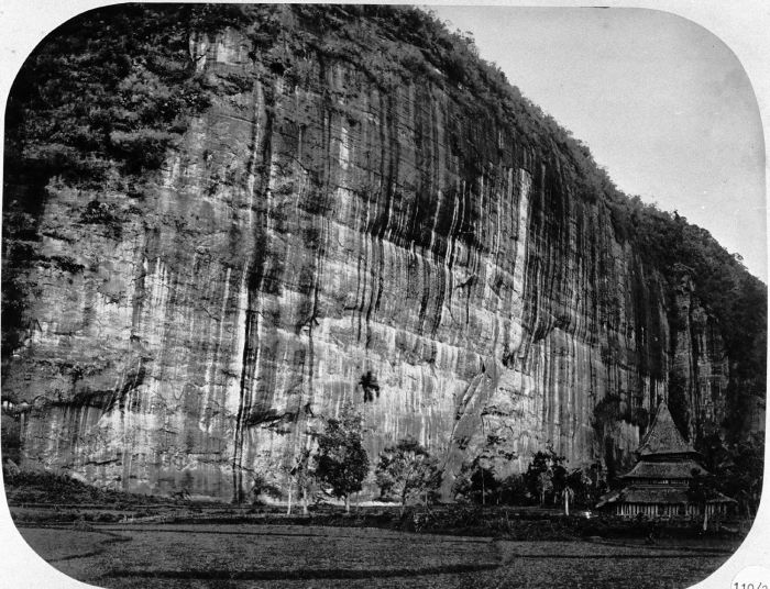 Foto. De kloof van Arau nabij Pajakoemboeh, Sumatra.